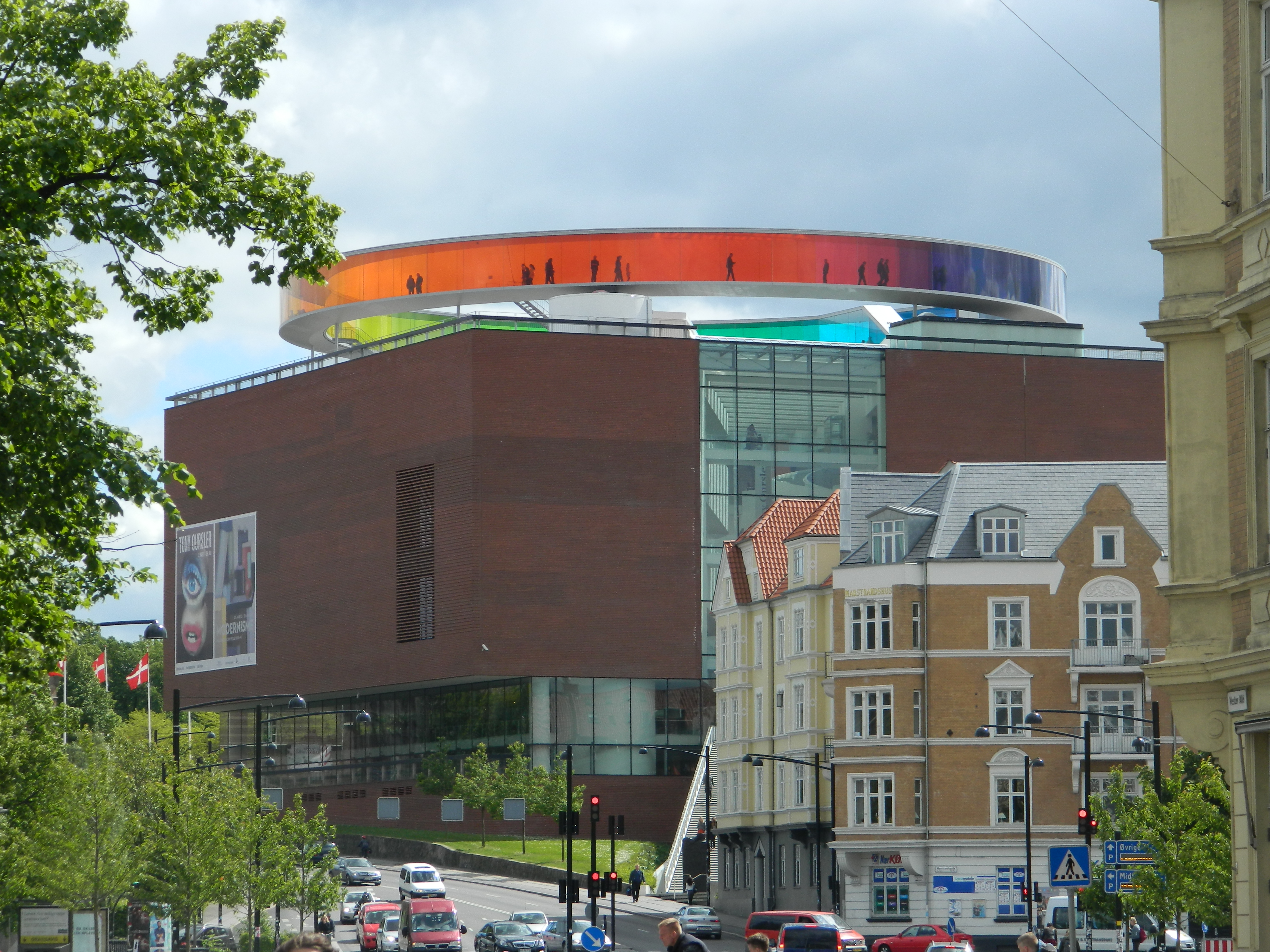 ARoS Arhus Art Museum